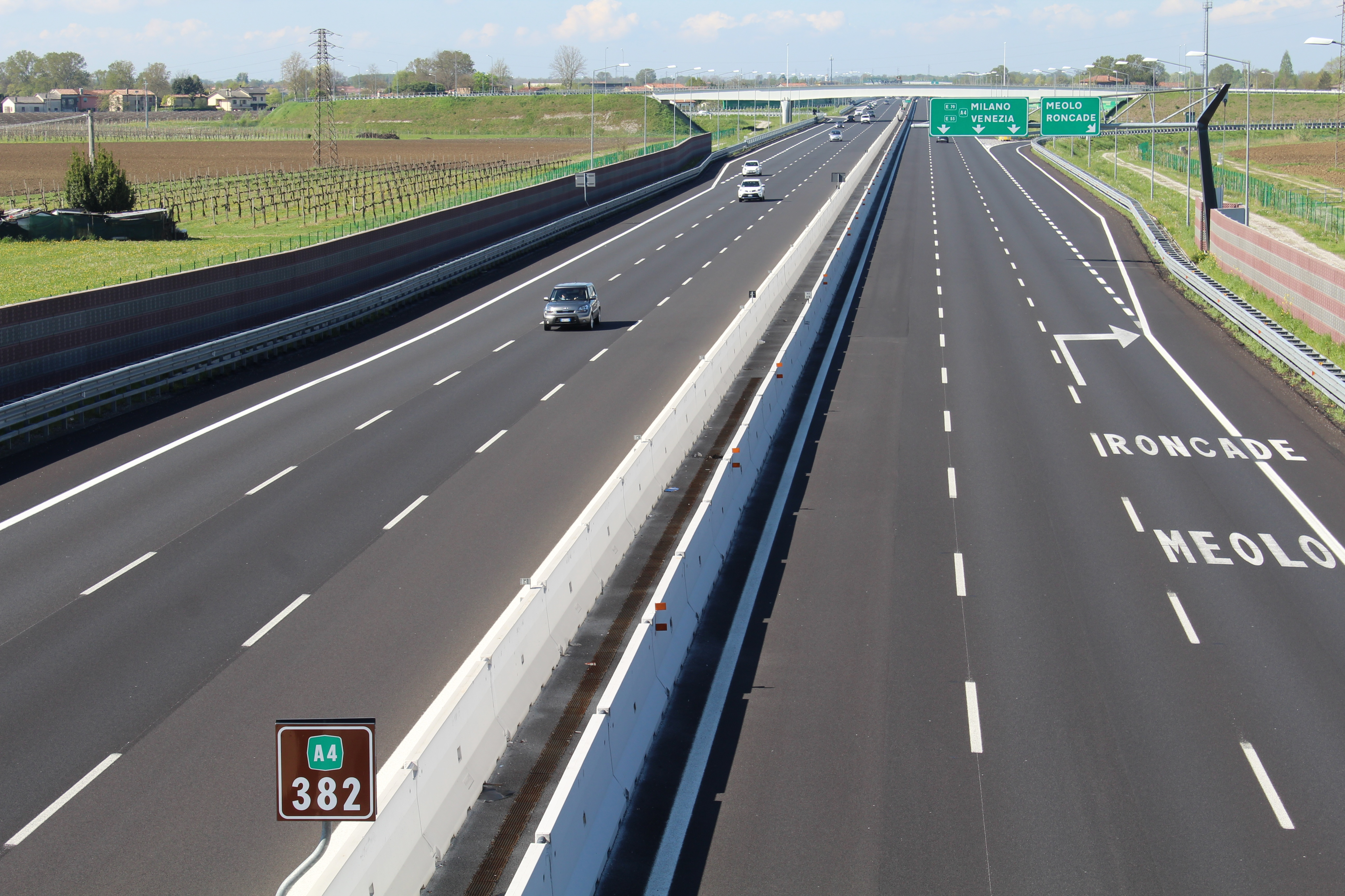 L'autostrada A4 italiana all'uscita Meolo-Roncade